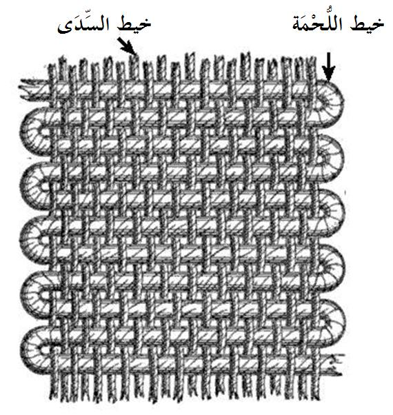 Osnova a utek